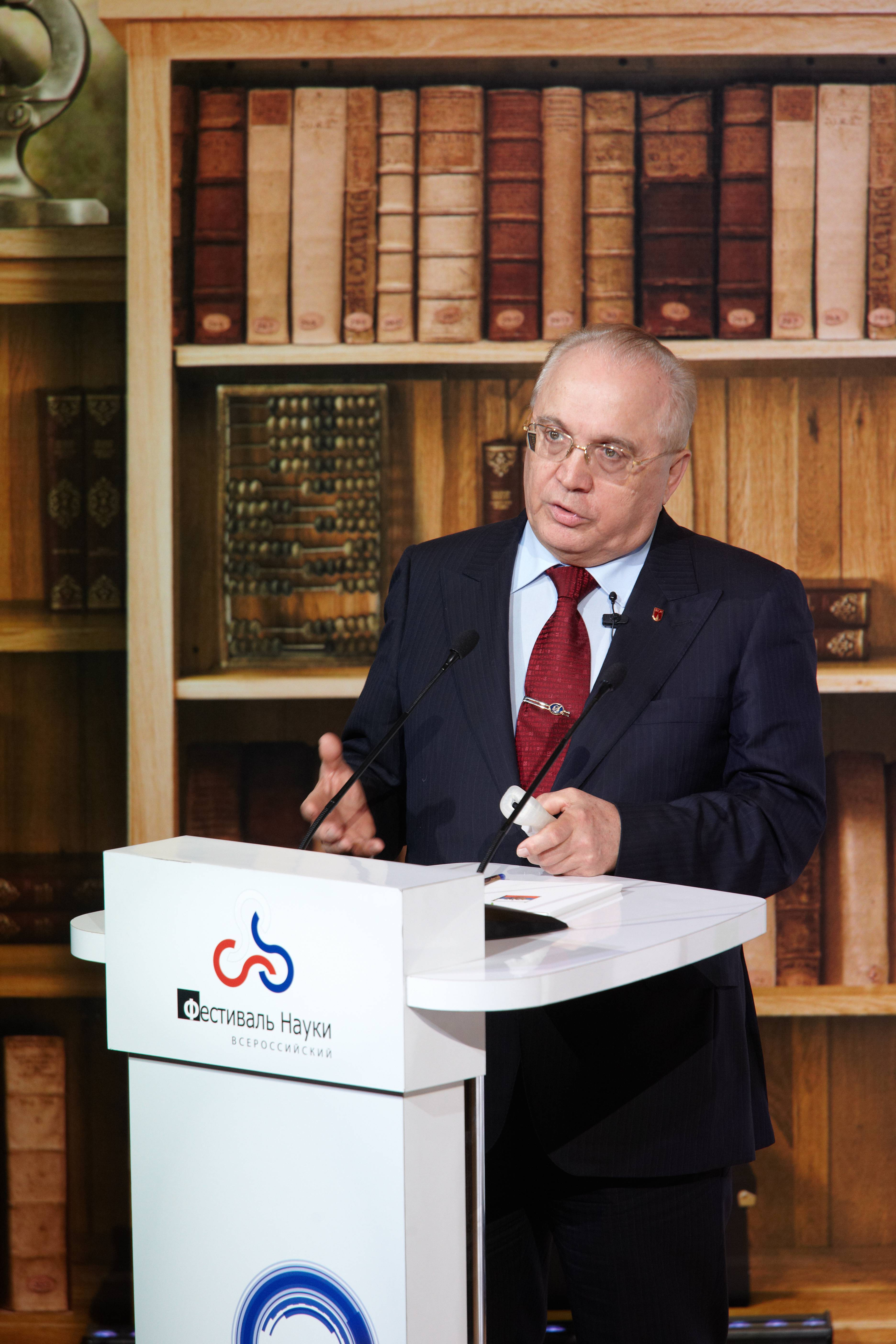 Ви́ктор Анто́нович Садо́вничий (род. 1939) — деятель российского высшего образования, ректор Московского государственного университета им. М. В. Ломоносова с 1992 года, российский математик, академик РАН. Президент Российского Союза ректоров с 1994.